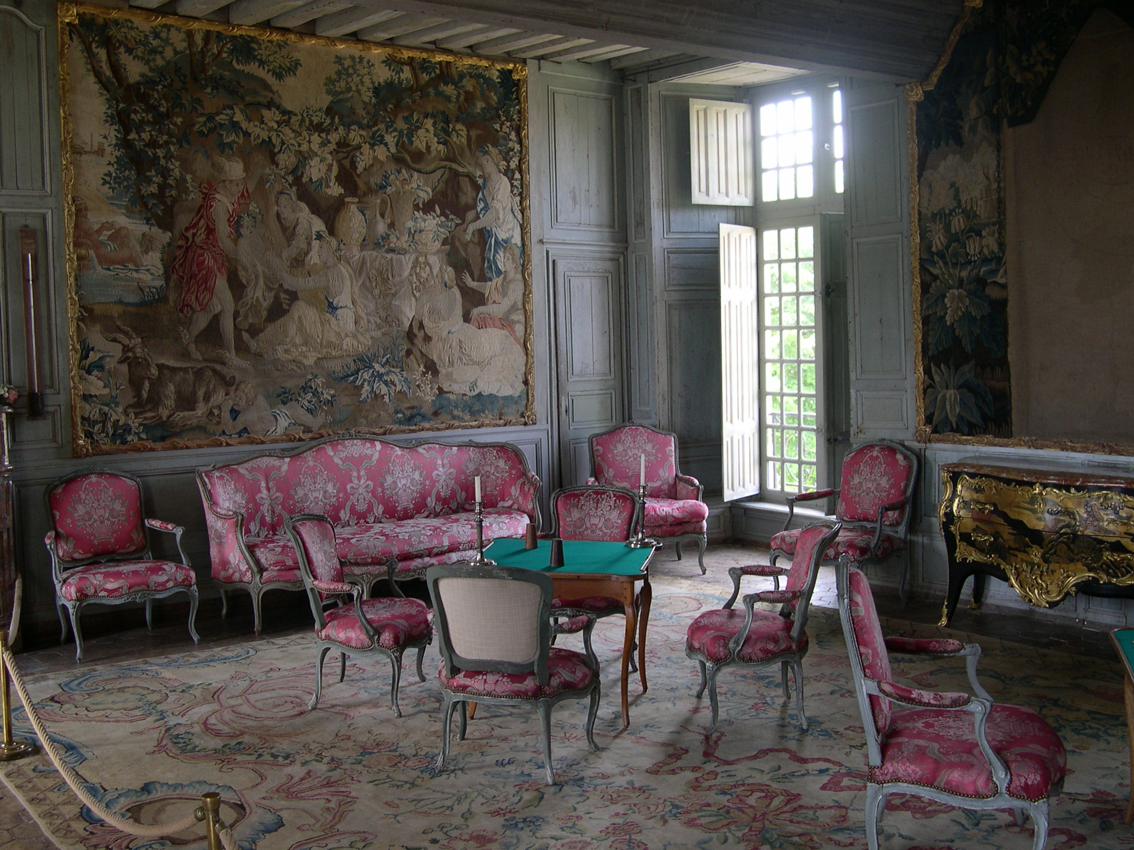 Schloss Talcy (Loir-et-Cher), Großer Salon